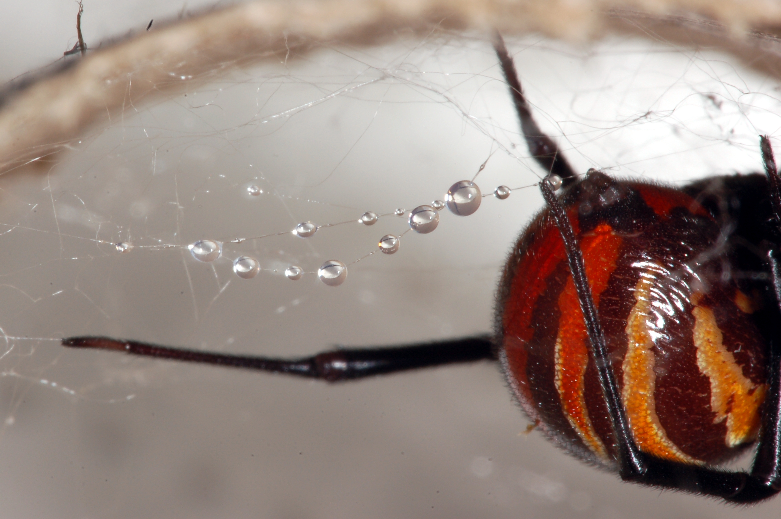 Latrodectus mactans (Fam. Theridiidae) in Gefangenschaft, Museum Wiesbaden, Deutschland